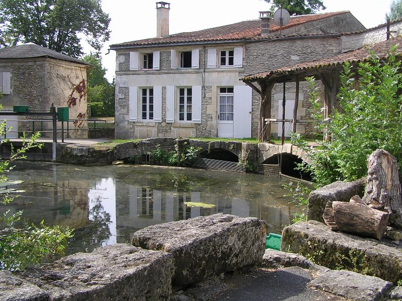 L'Antenne à Javrezac (Charente, France).